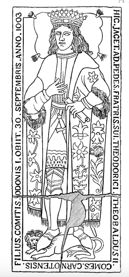 Theobald II of Blois